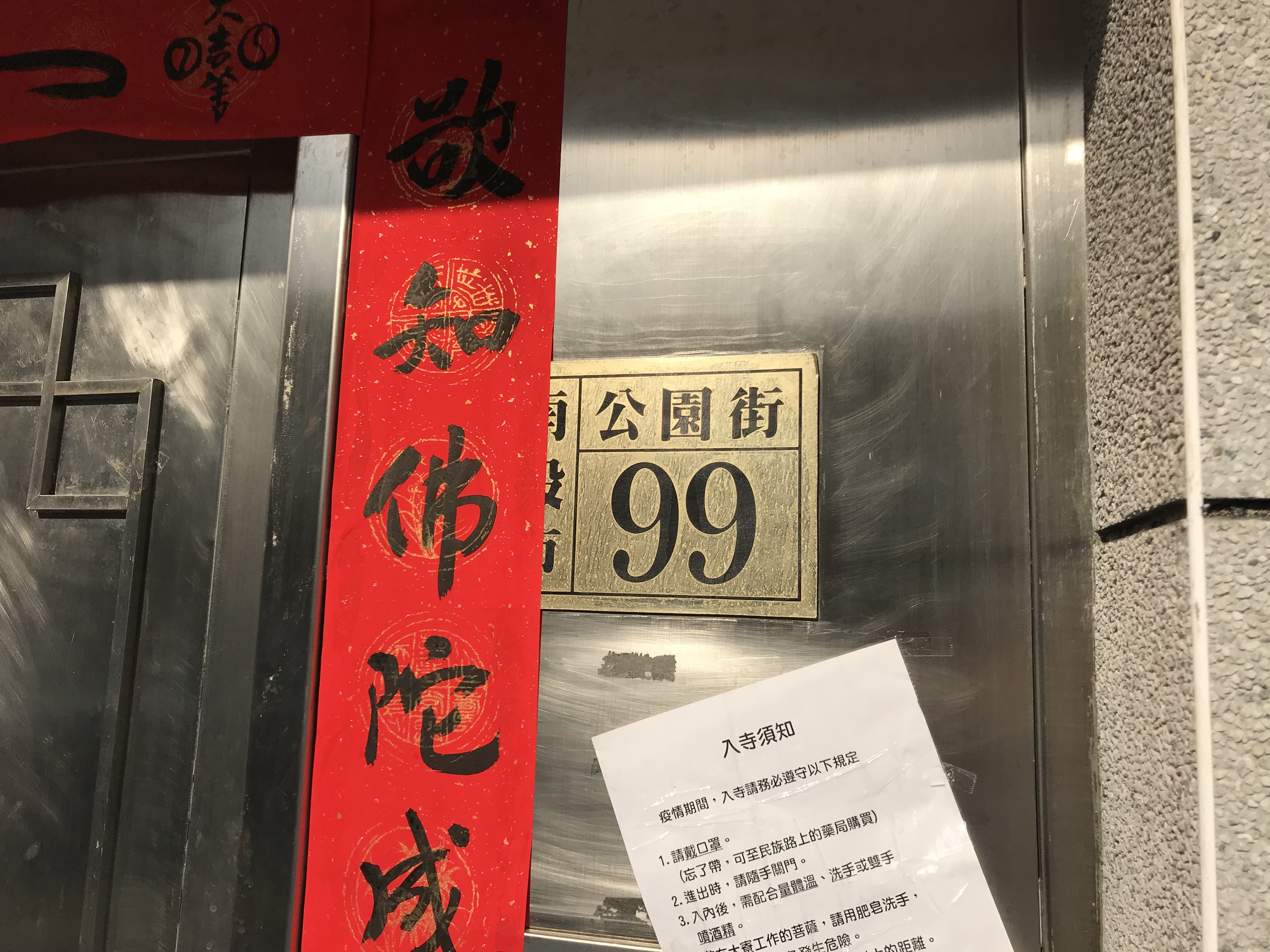 南投龍泉寺門牌